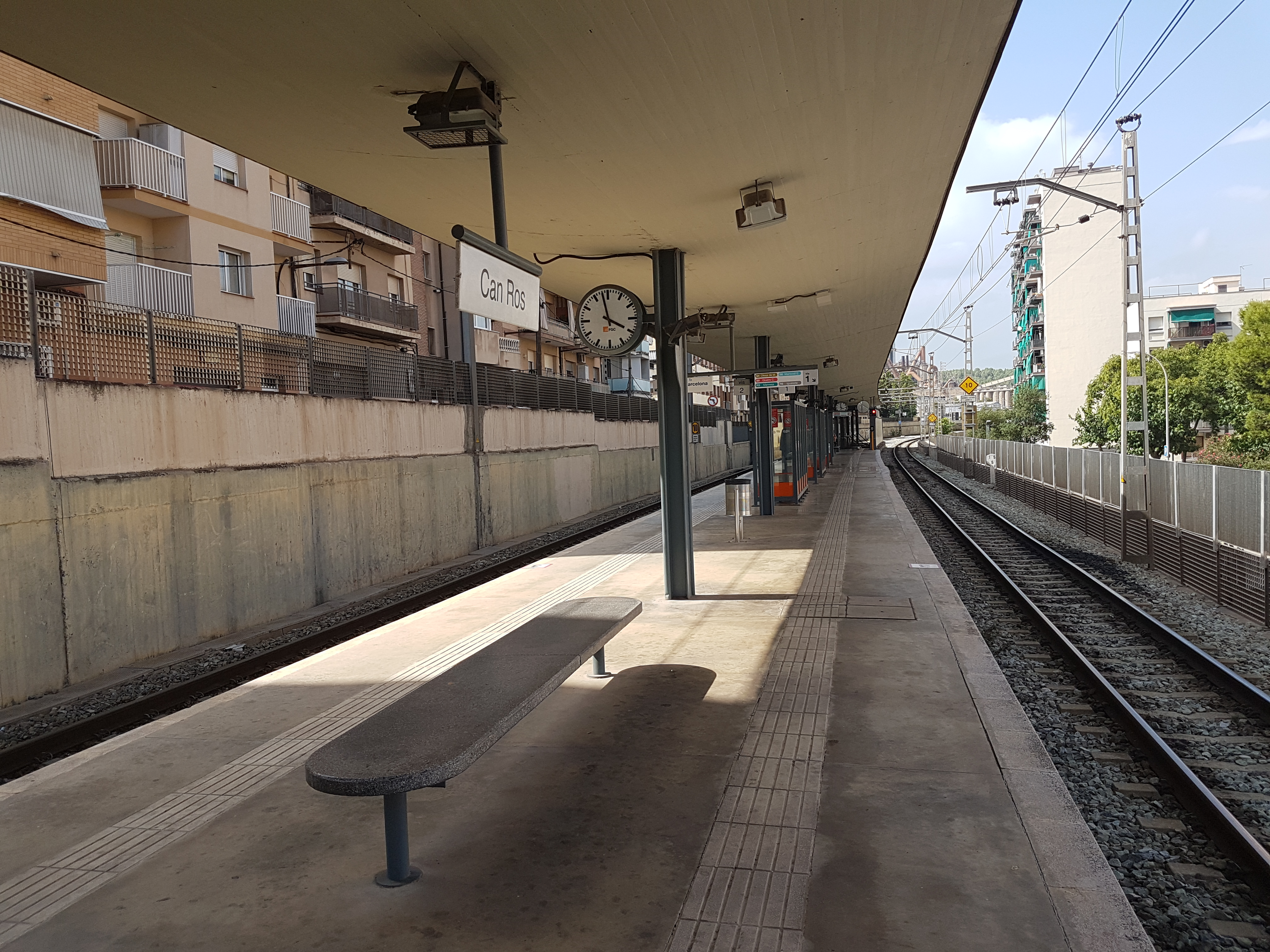 Andana central de l'estacio de Can Ros de la línia Llobregat-Anoia de FGC